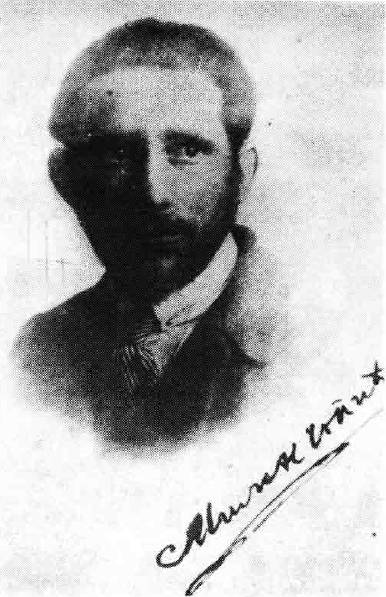 Srpskohrvatski / српскохрватски: Milan Ćopić, slikan u emigraciji u Beču 1921.